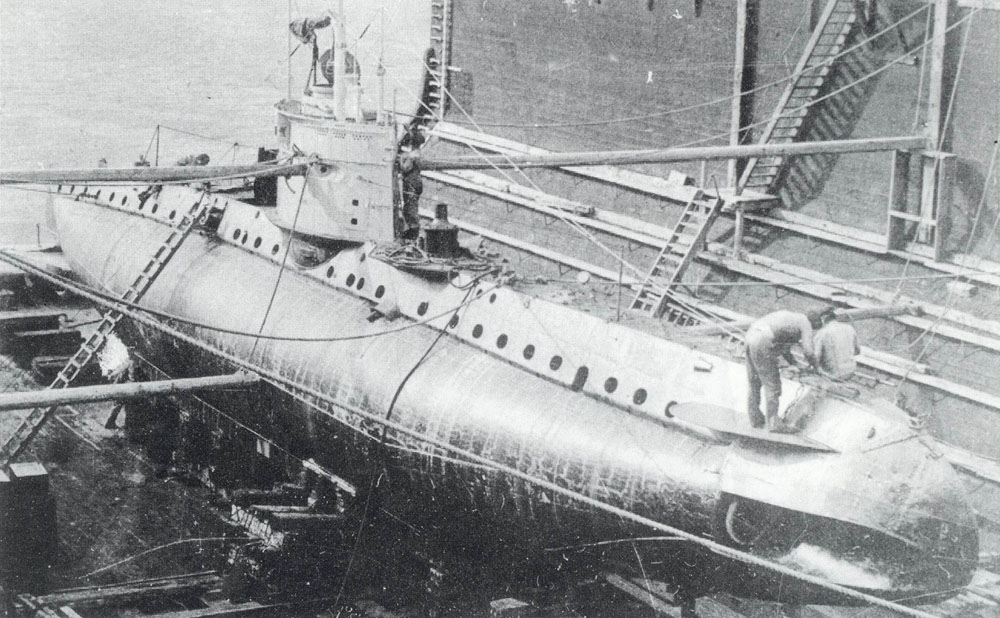 K.u.K. U-10, das ehemalige SM UB-1 der kaiserlichen deutschen Kriegsmarine Endmontage im Dock in Pola